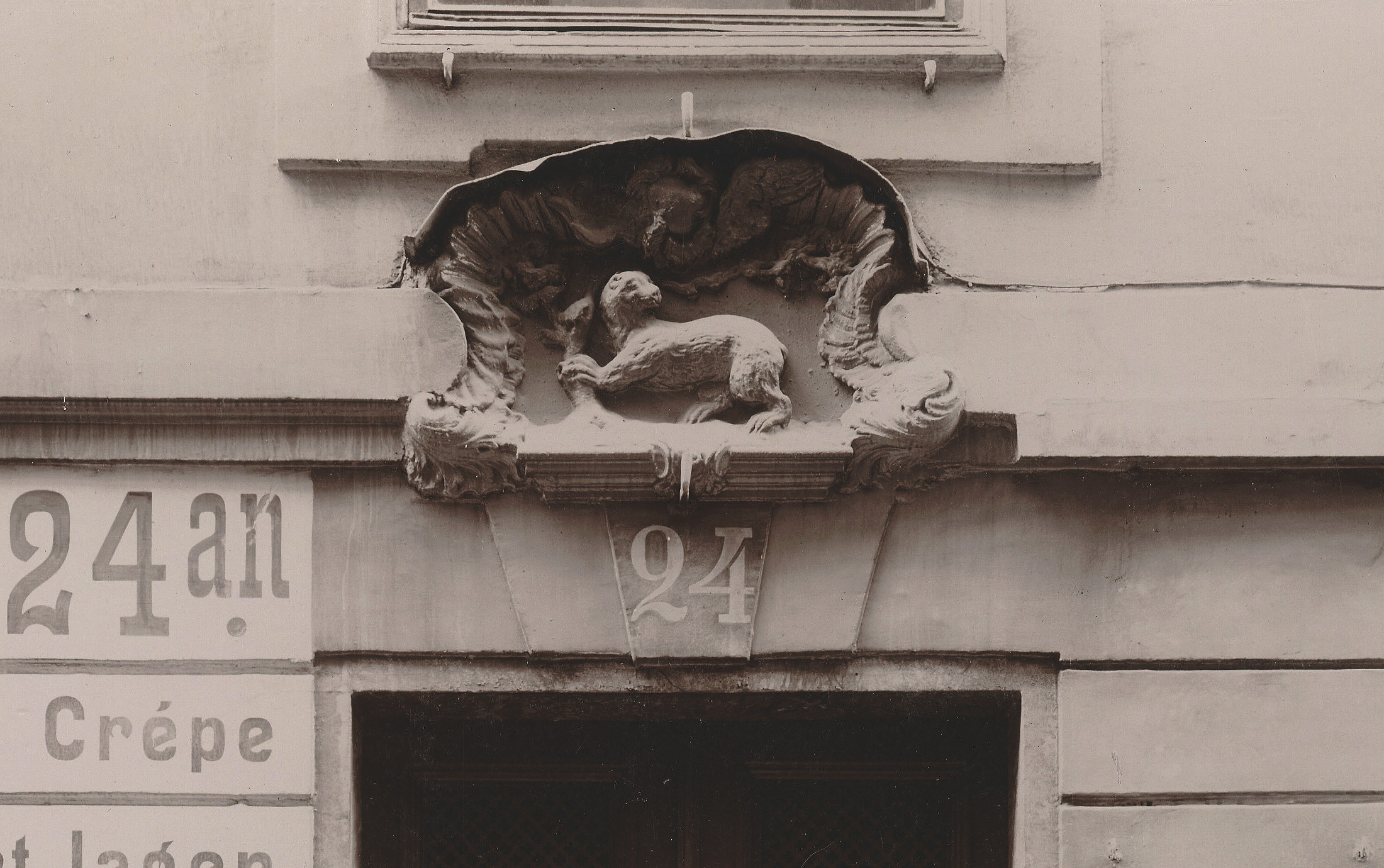 Relief över porten Västerlånggatan 24A